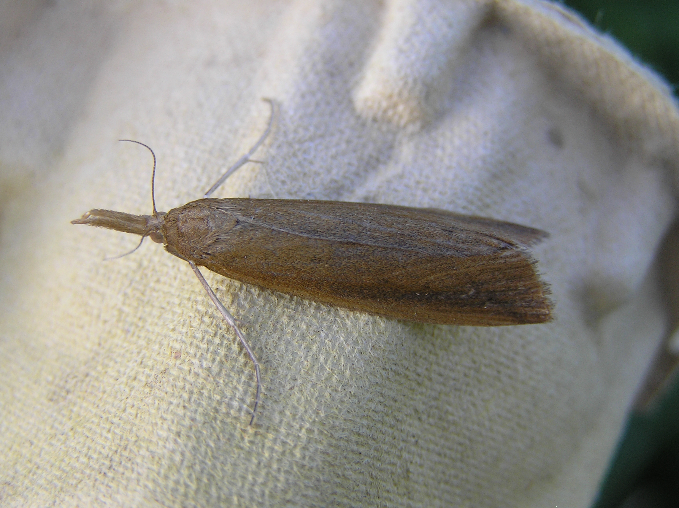 Schoenobius gigantella female